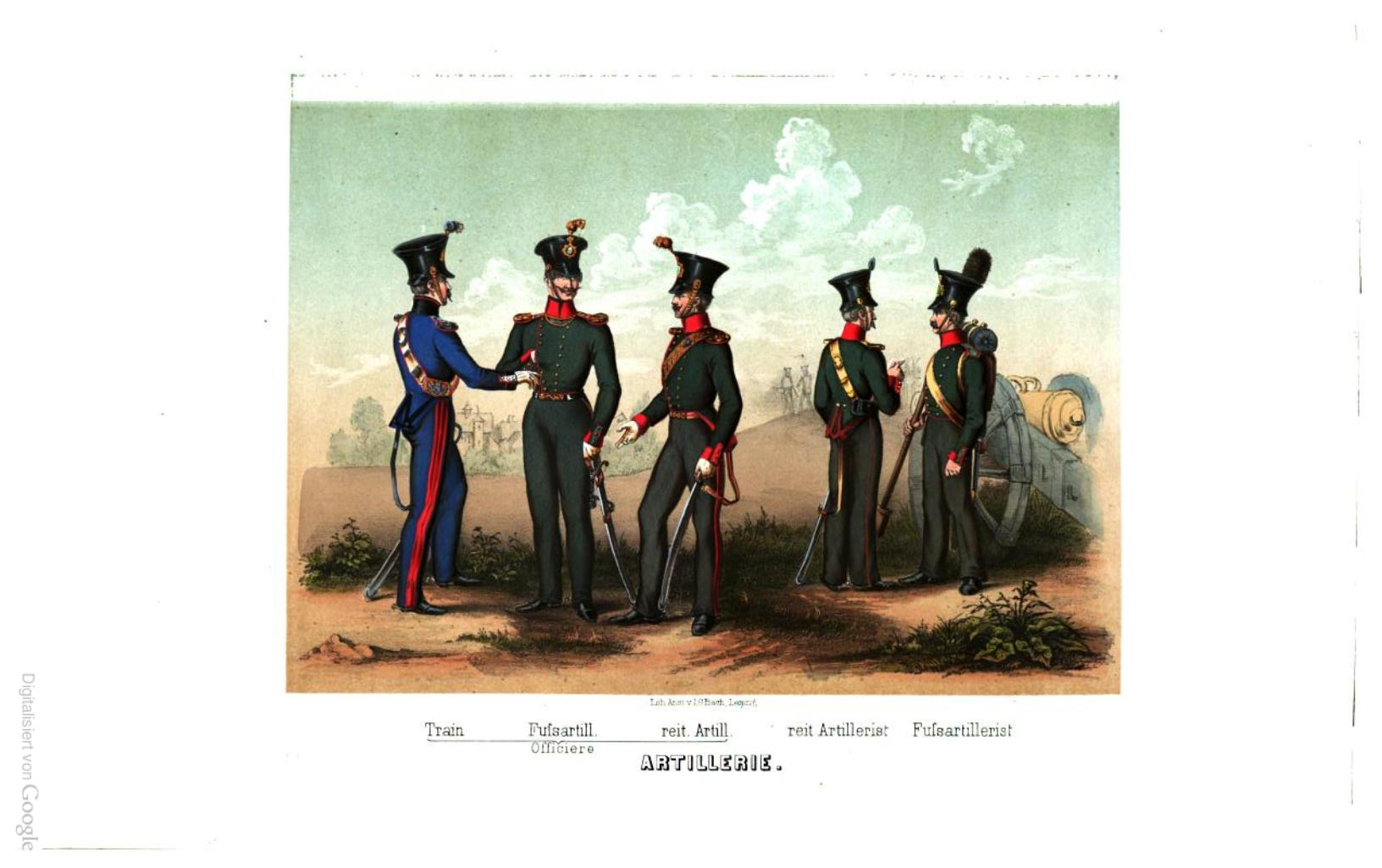 sächsische Uniformen Artillerie 1832